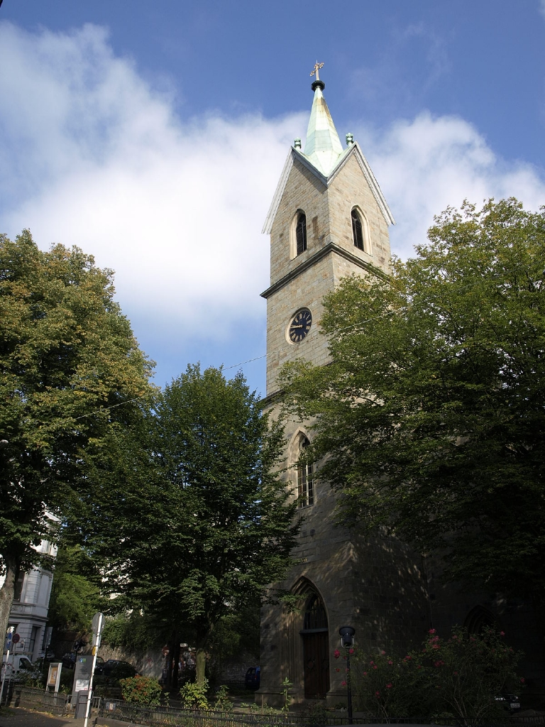 Diakoniekirche Wuppertal, Friedrichstraße Quartier Nordstadt. Ehemalige evang. Kreuzkirche. Denkmalnr. 1909 This is a photograph of an architectural monument. 1909